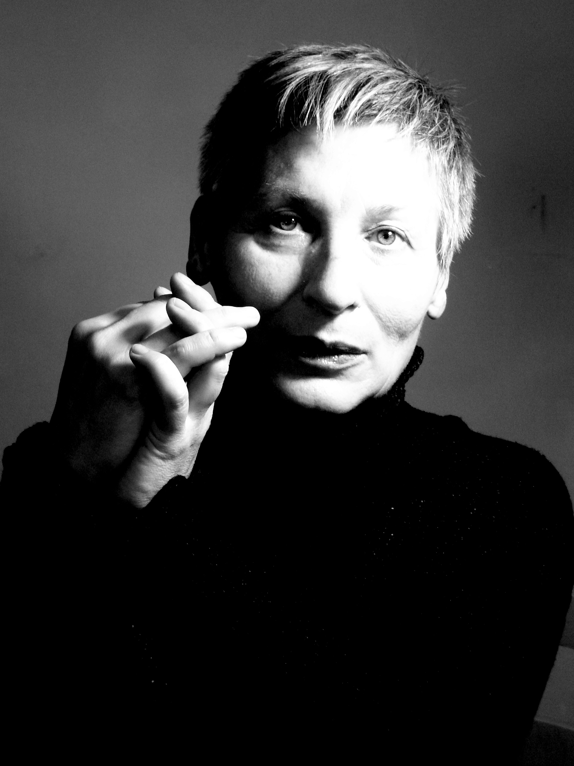 foto primo piano Marion D'Amburgo